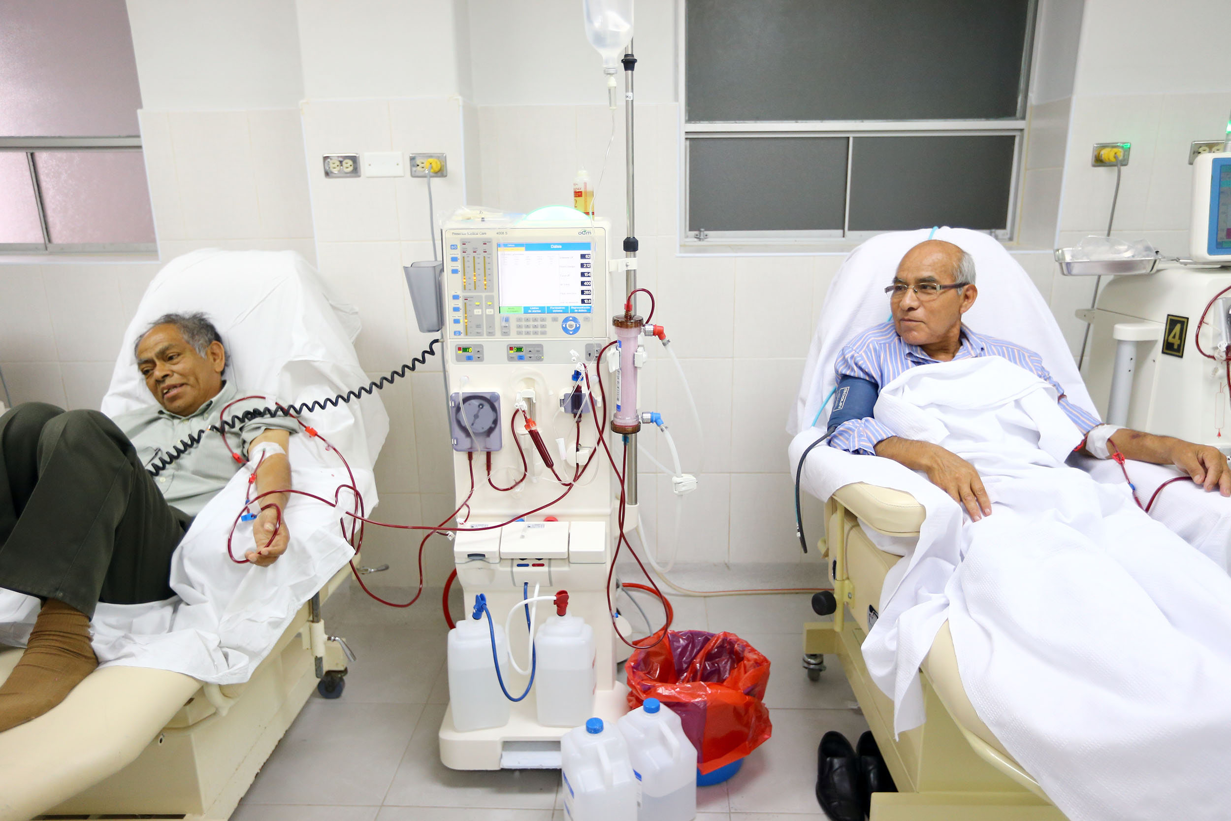 El ministro de Defensa, Pedro Cateriano, visita las instalaciones remodeladas del Hopital Naval en el distrito del Callao.